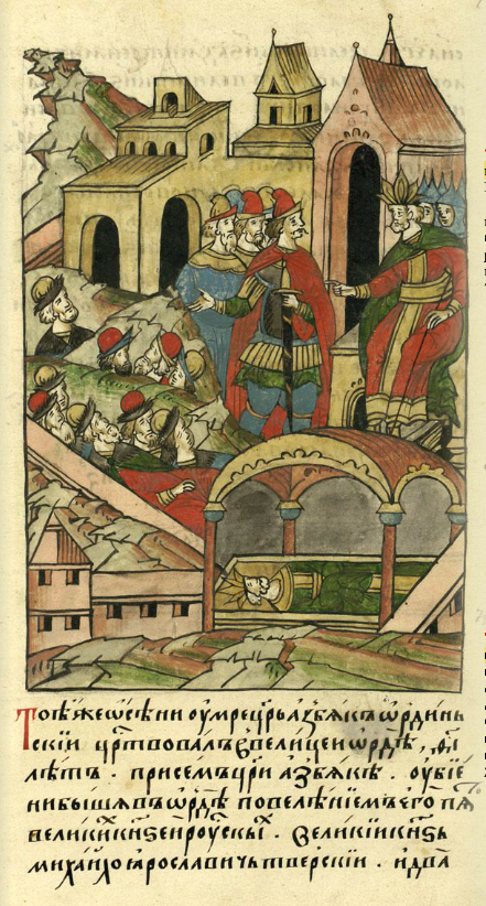 ЛИЦЕВОЙ ЛЕТОПИСНЫЙ СВОД Той же осенью умер царь Азбяк Ордынский. Царствовал в Великой Орде 19 лет. При этом царе Азбяке в Орде его повелением было убито пять великих русских князей: великий князь Михайло Ярославич Тверской, и два [сына его, великий князь Дмитрий Михайлович и брат его великий князь Александр Михайлович, великий князь Василий Рязанский, великий князь Иван Ярославич Рязанский; да три удельных князя: князь Александр Новосельский, князь Федор Александрович, внук святого блаженного великого князя Михаила Ярославича Тверского, и князь Федор Иванович Стародубский. При этом же царе Азбяке убит был в Орде благочестивый и великий князь Юрий Данилович Московский великим князем Дмитрием Михайловичем Тверским, без повеления царя Азбяка. А всего убито было царем Азбяком в Орде великих князей и удельных князей — девять человек.]